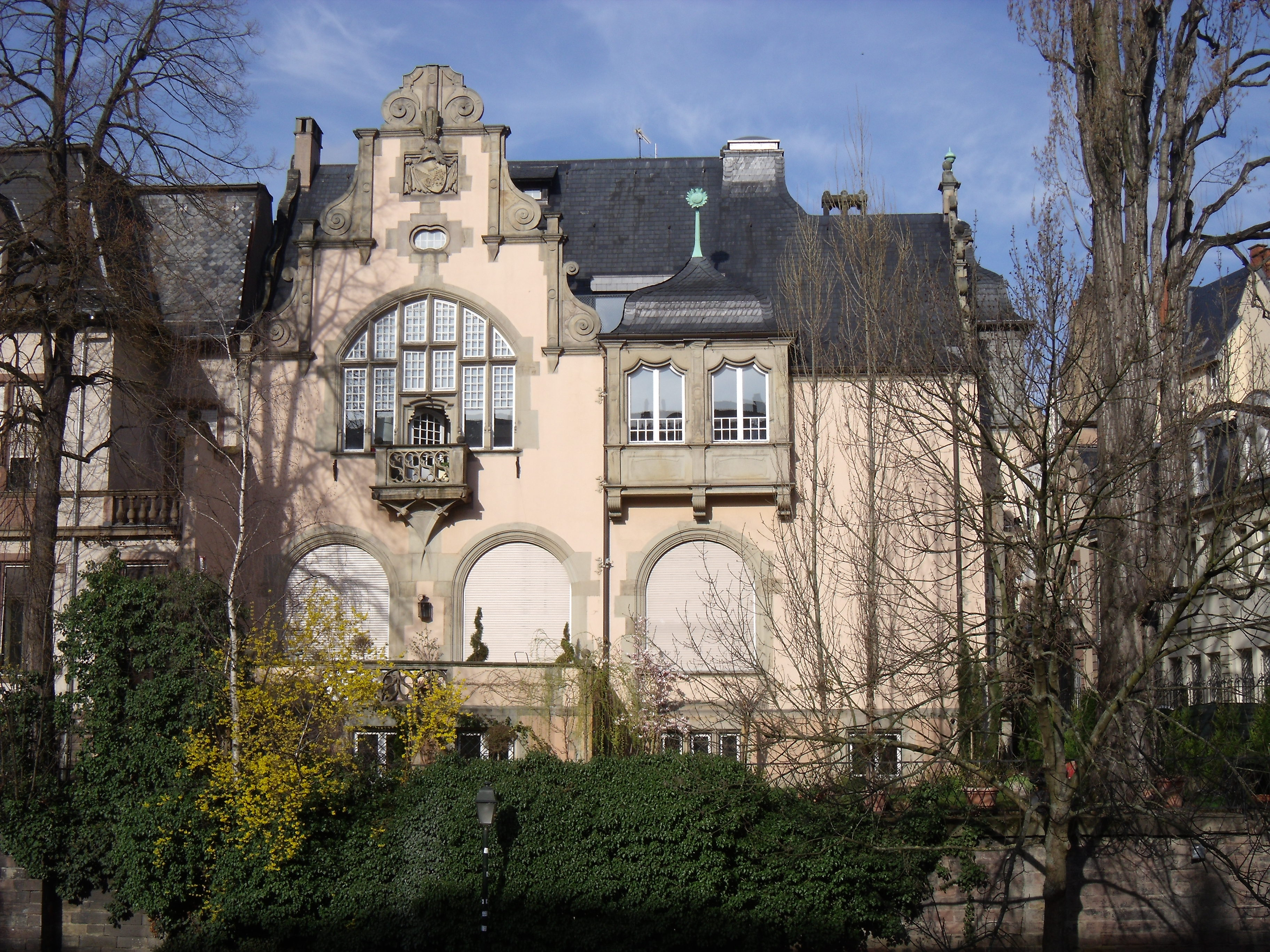 Ehemaliges Haus des Corps Palatia Straßburg (KSCV)